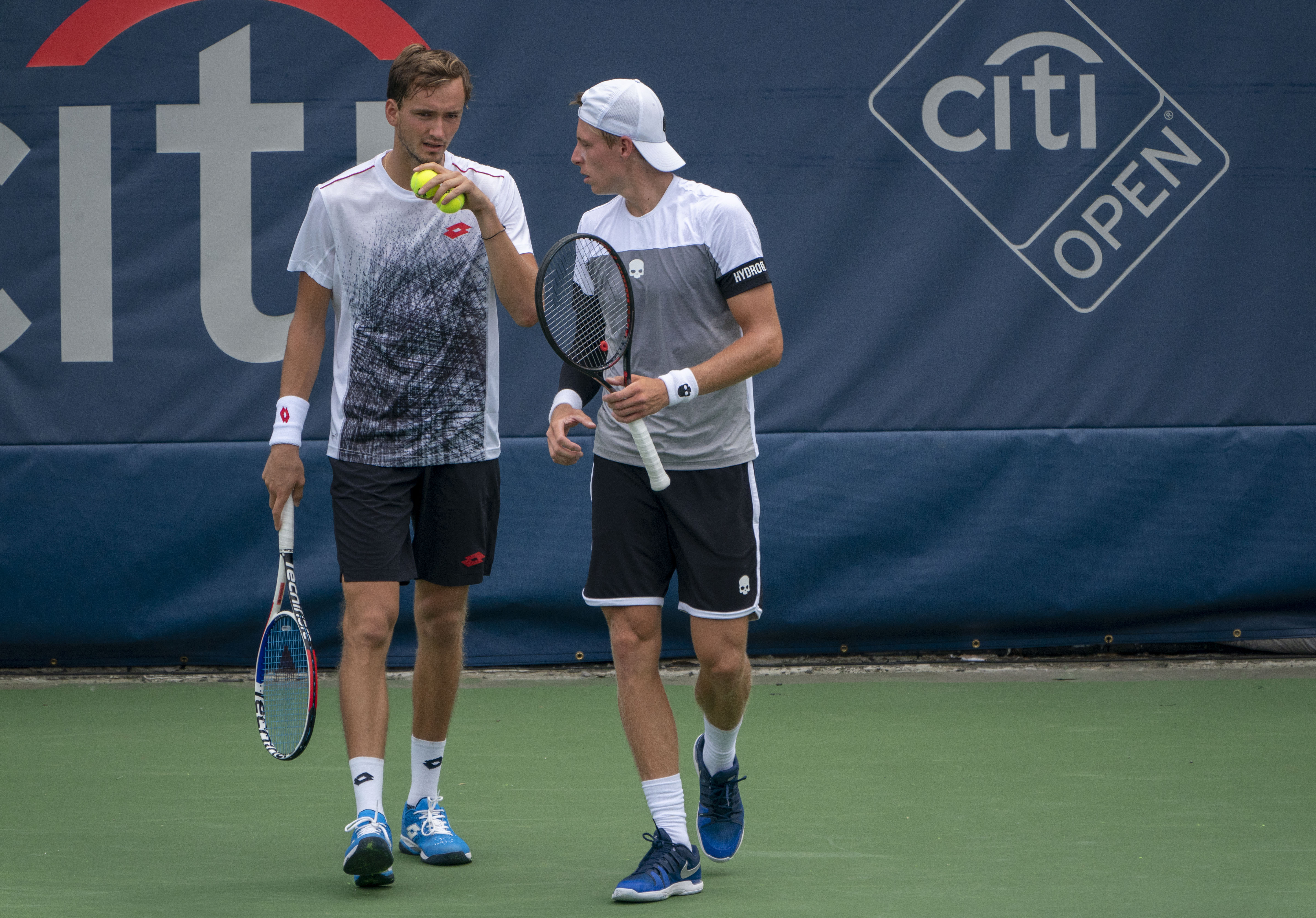 2018 Citi Open Tennis